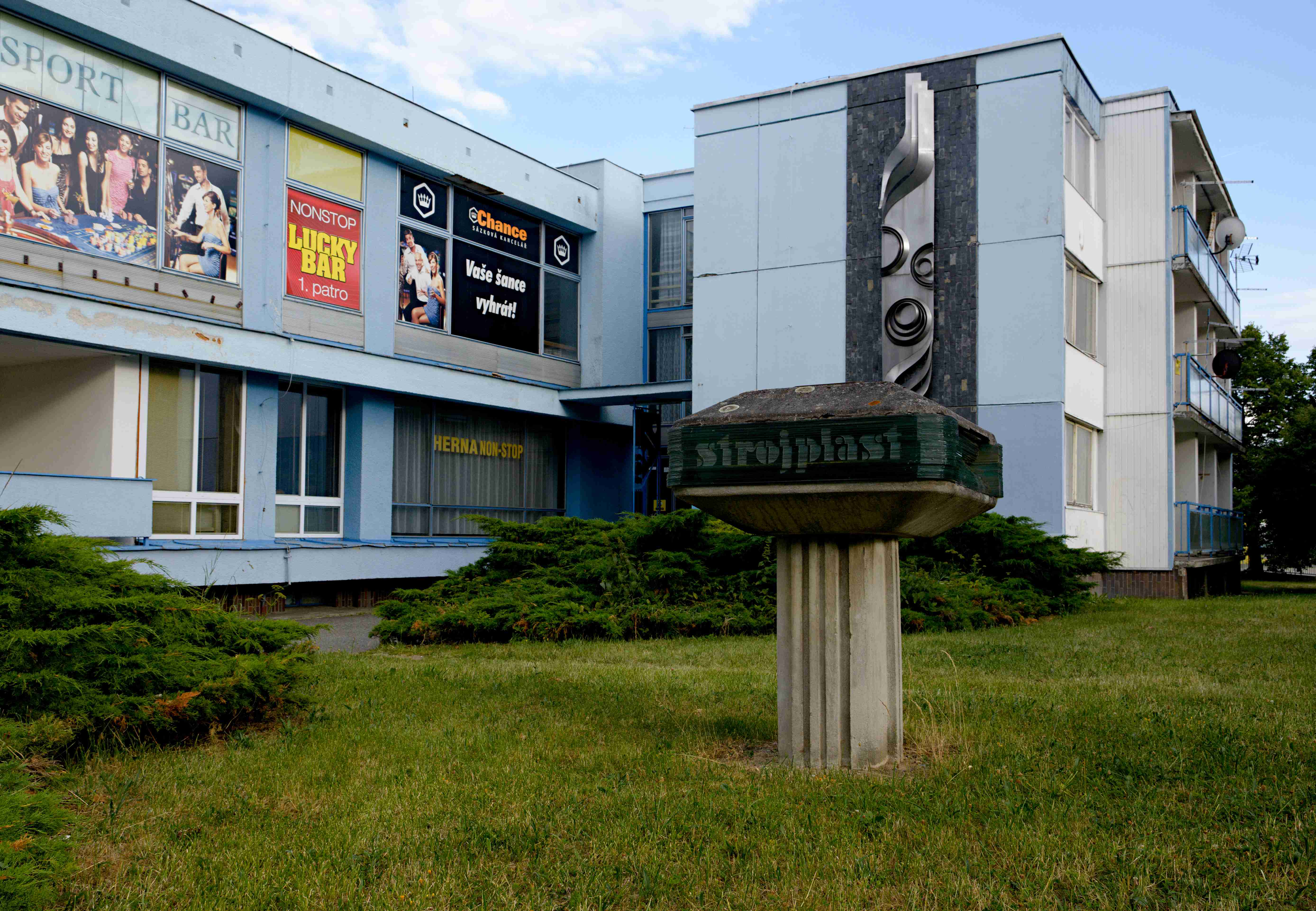 Ubytovna stojící na místě zničené ubytovny